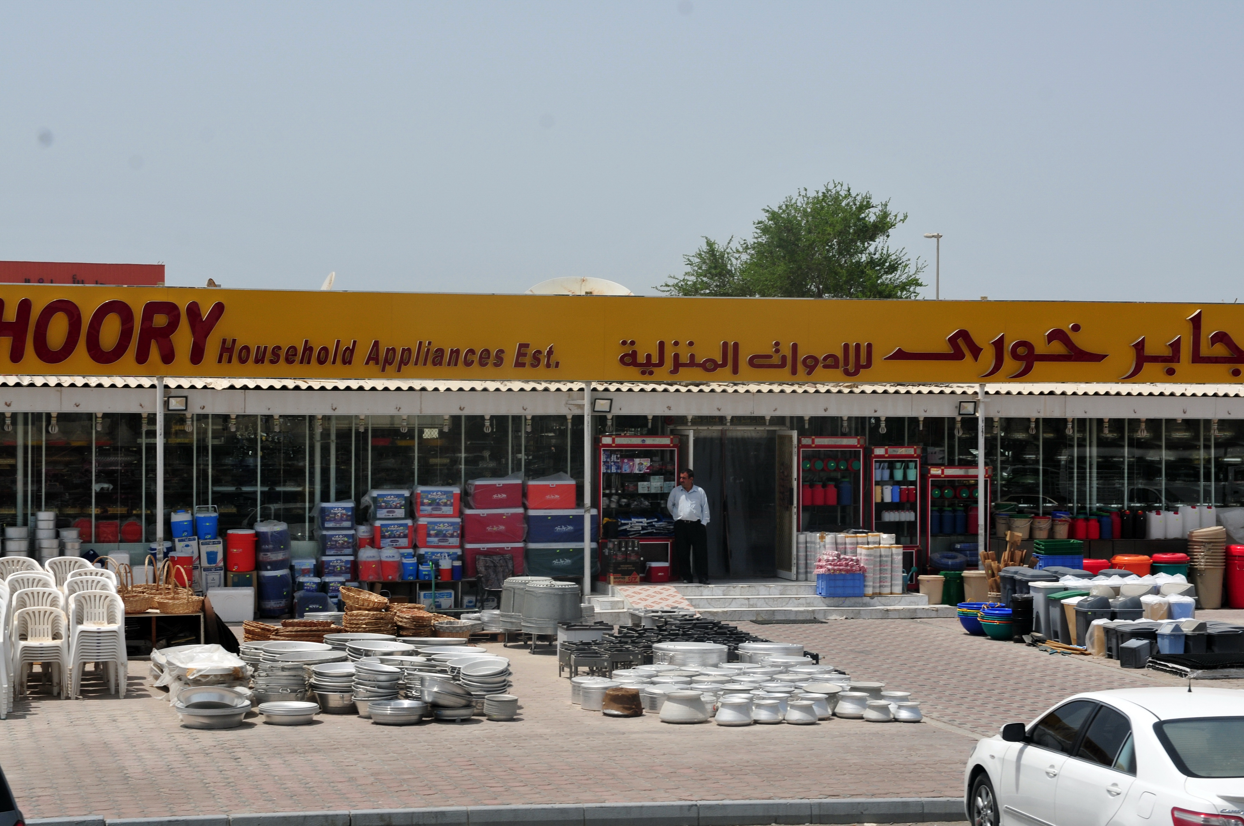 travel to Wikimania 2013: Abu Dhabi